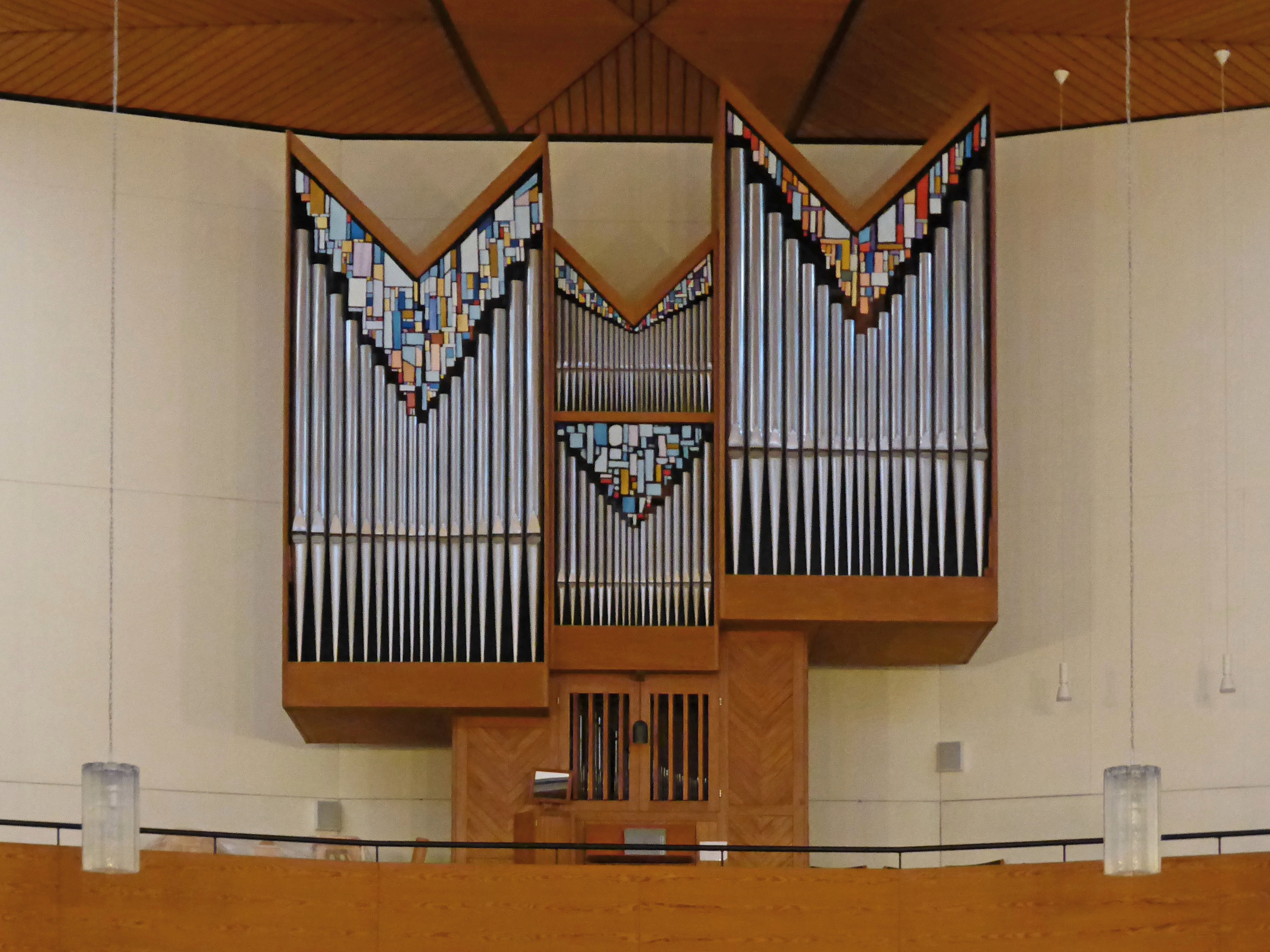 Lobback-Orgel in der St.-Heinrich-Kirche in Wolfsburg.